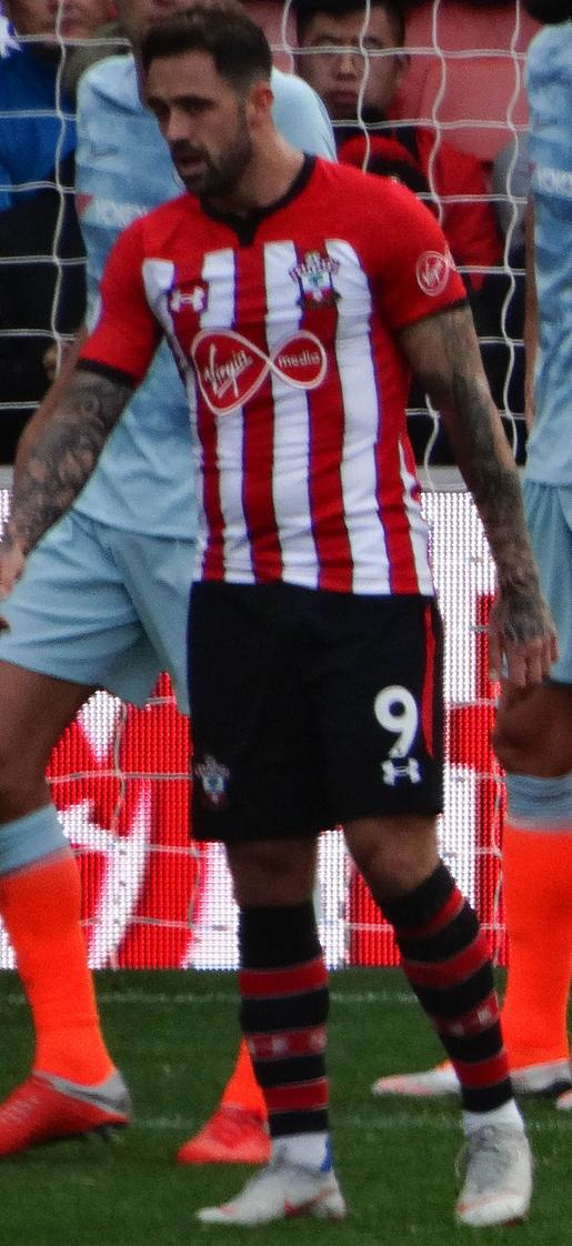 Danny Ings in Southampton